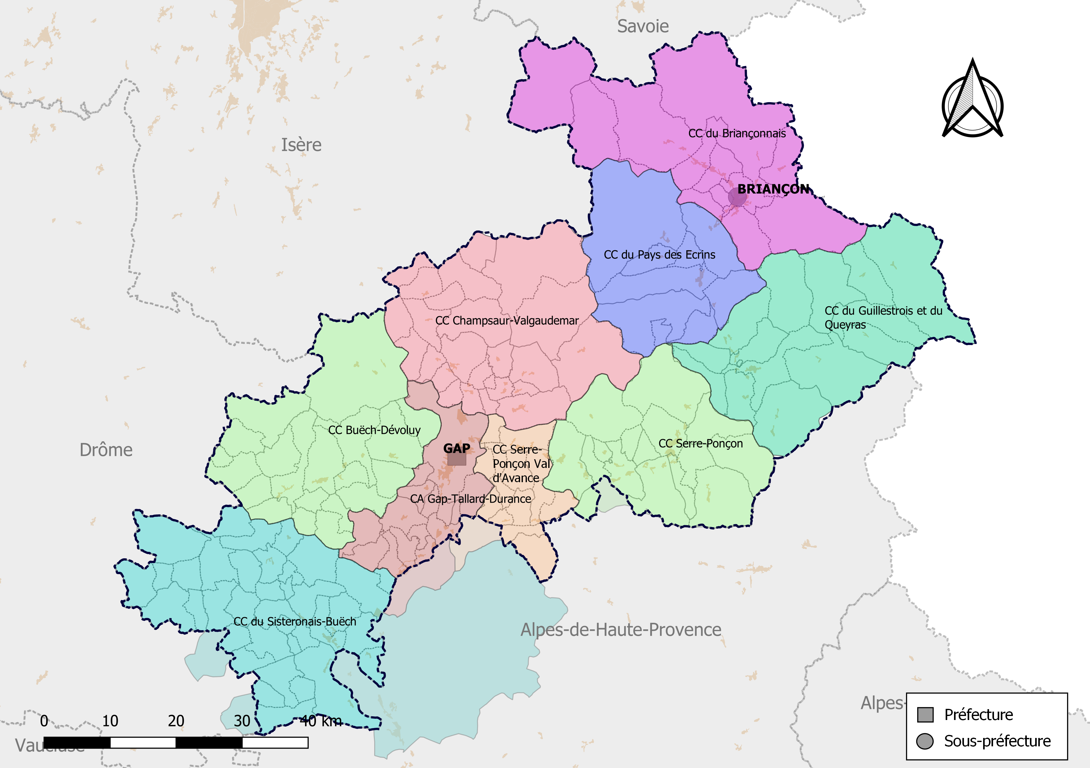 Carte des intercommunalités du département des Hautes-Alpes, France. Composition au 1er janvier 2019